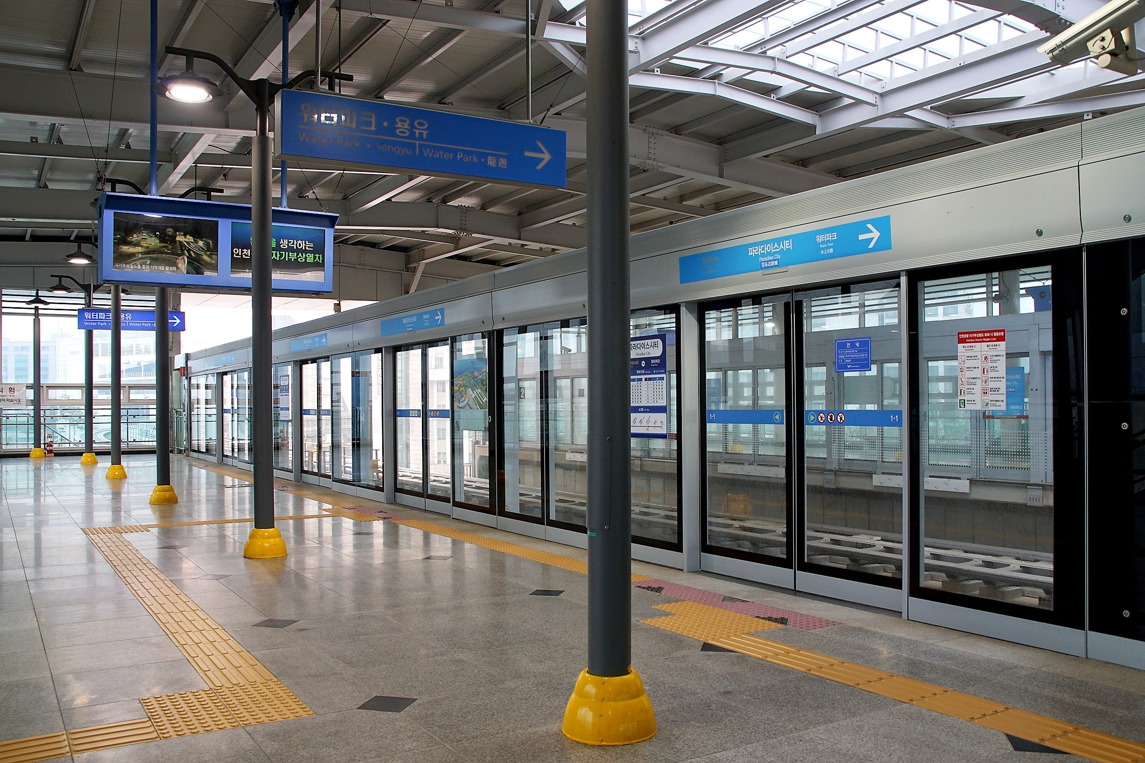 Magnetschwebebahn Incheon Airport Maglev (Haltestelle Paradise City). The signs point the direction to Water Park station, next stop.